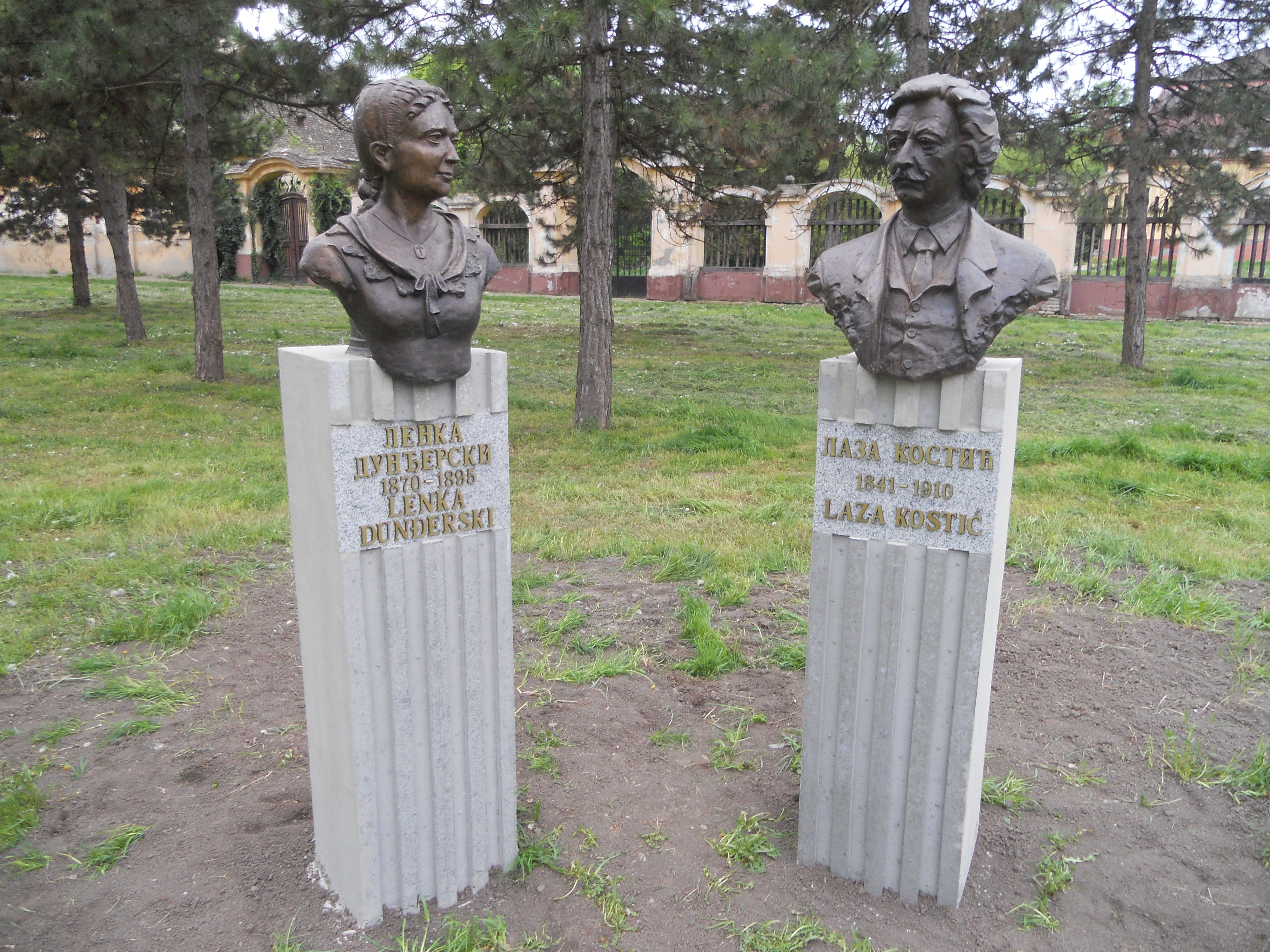 Srpski (latinica): Spomenici u spomeničkom kompleksu u parku u Kulpinu Lenke Dunđerski i Laze Kostiča od 10.04. 2016